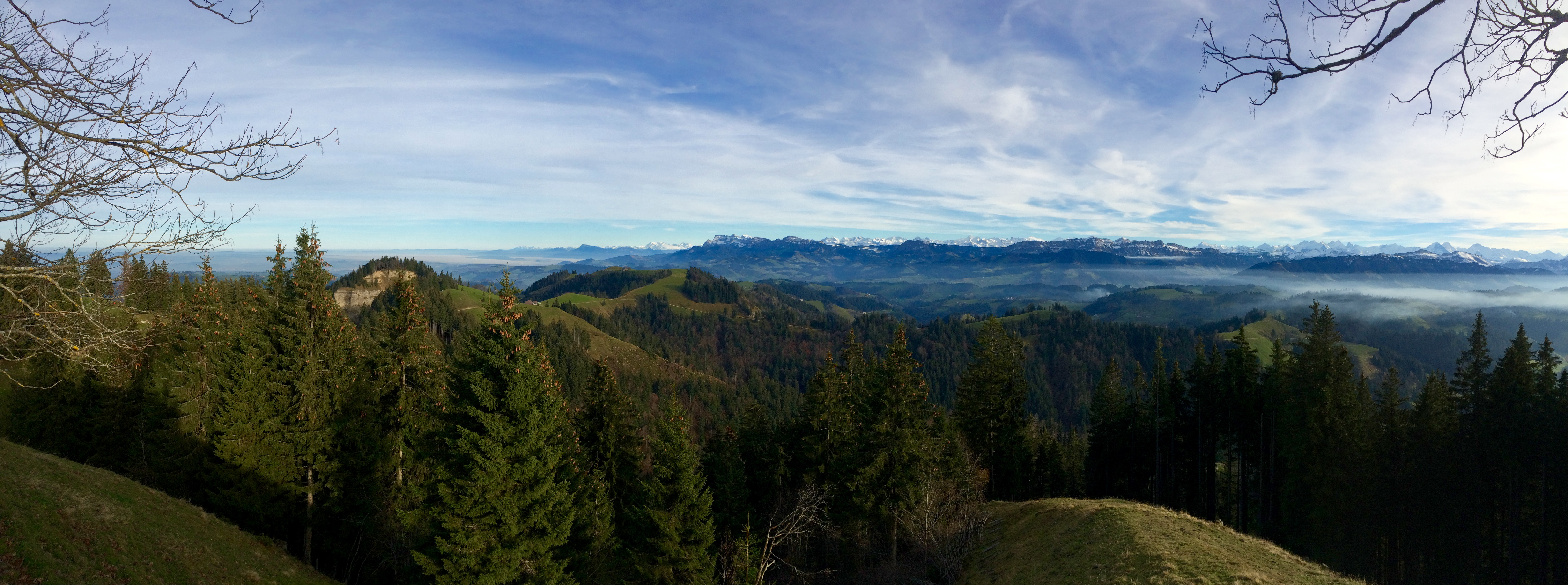 Links (in weiter Ferne) der Säntis, Bildmitte der Pilatus, Mittaggüpfi und Schimbrig. Rechts der Beichle.